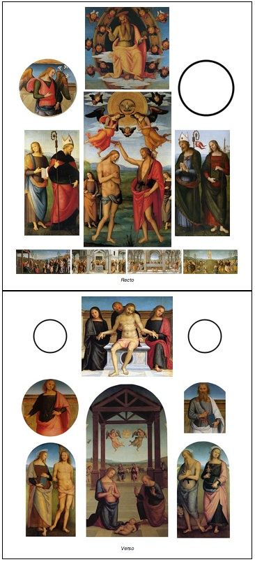 Montage d'éléments permettant une vue globale du Polyptyque de Sant'Agostino